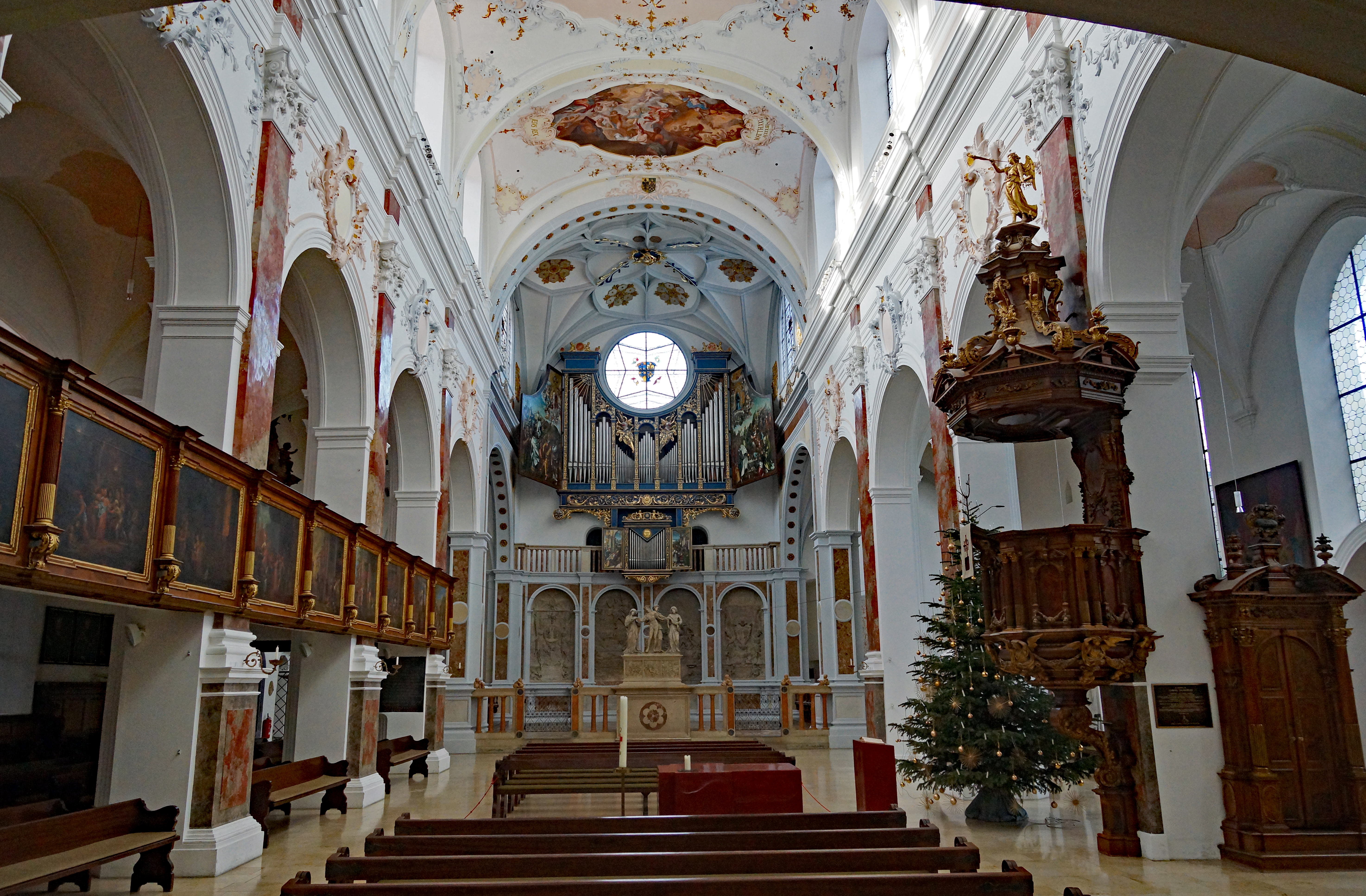 2019-01-27 Augsburg 068 St. Anna, Fuggerkapelle